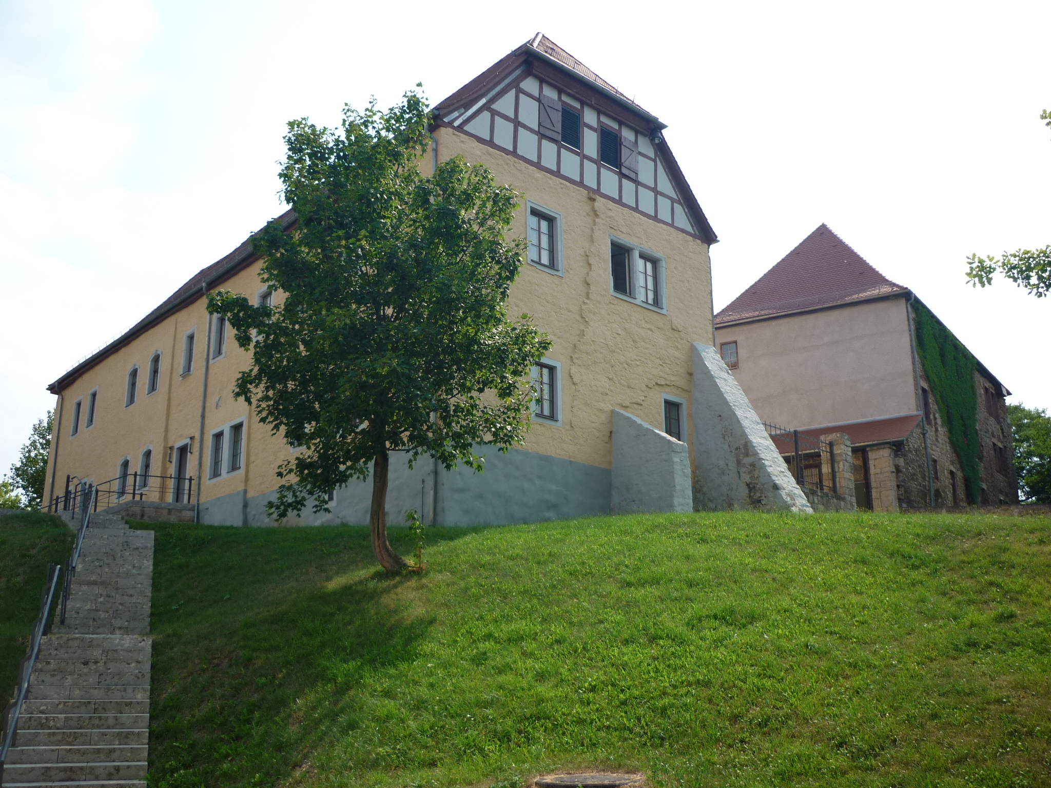 Schloss Apolda - Gesamtansicht